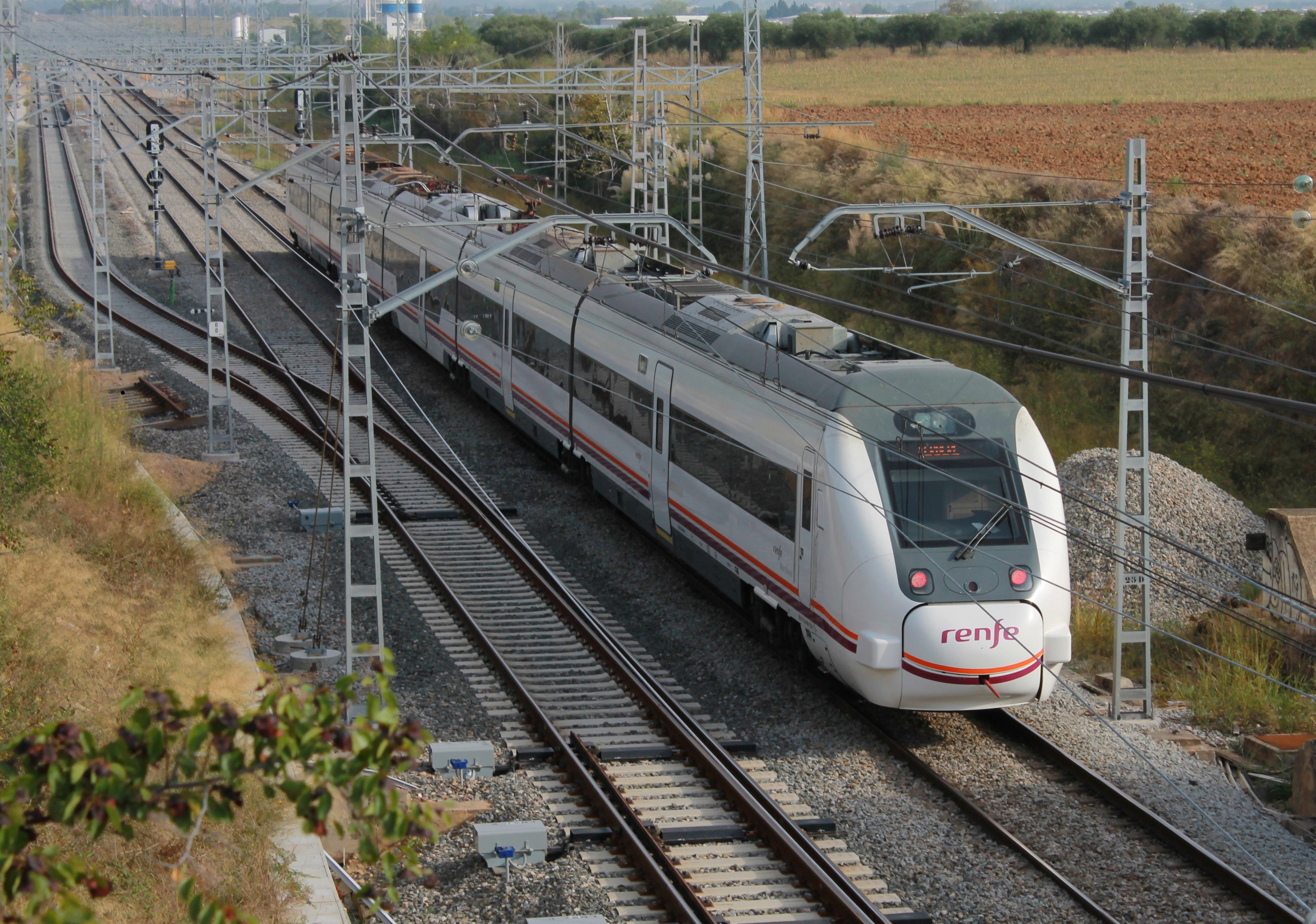 Automotor 449 en la línea Barcelona-Cerbère en la estación de Vilamalla.